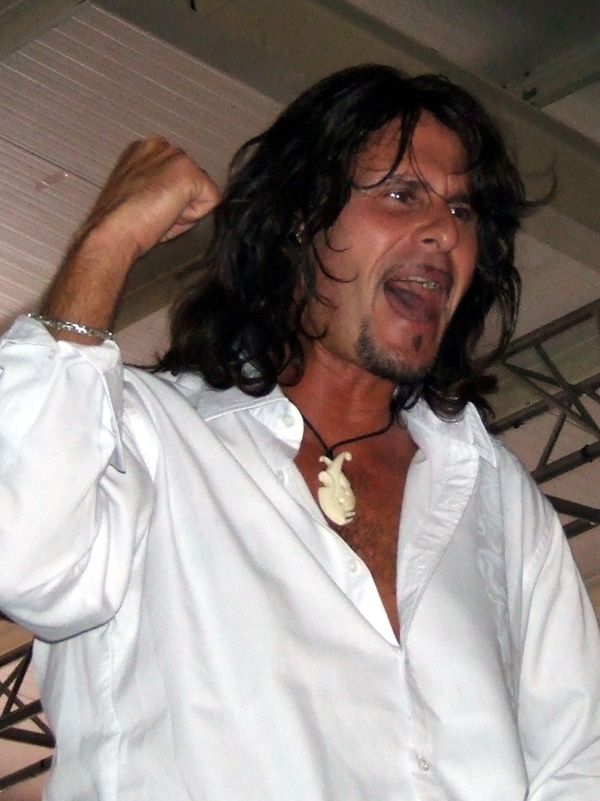 Gotthard. Lorca Rock Festival (Lorca, Murcia), 18/06/2006